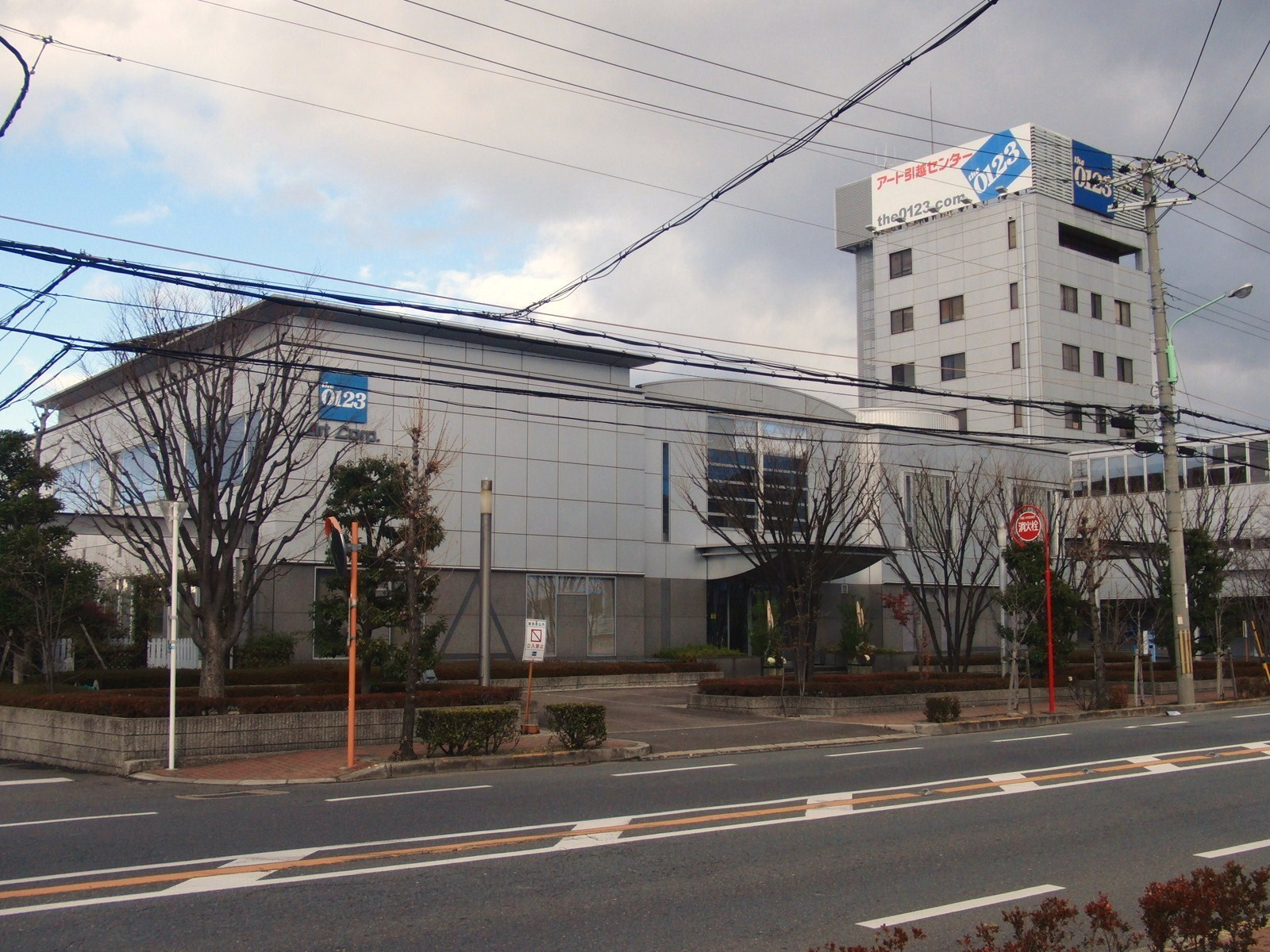 アートコーポレーション本社を撮影